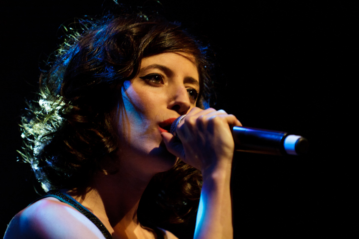 אפרת גוש בהופעה באולם סמולארש באוניברסיטת ת"א